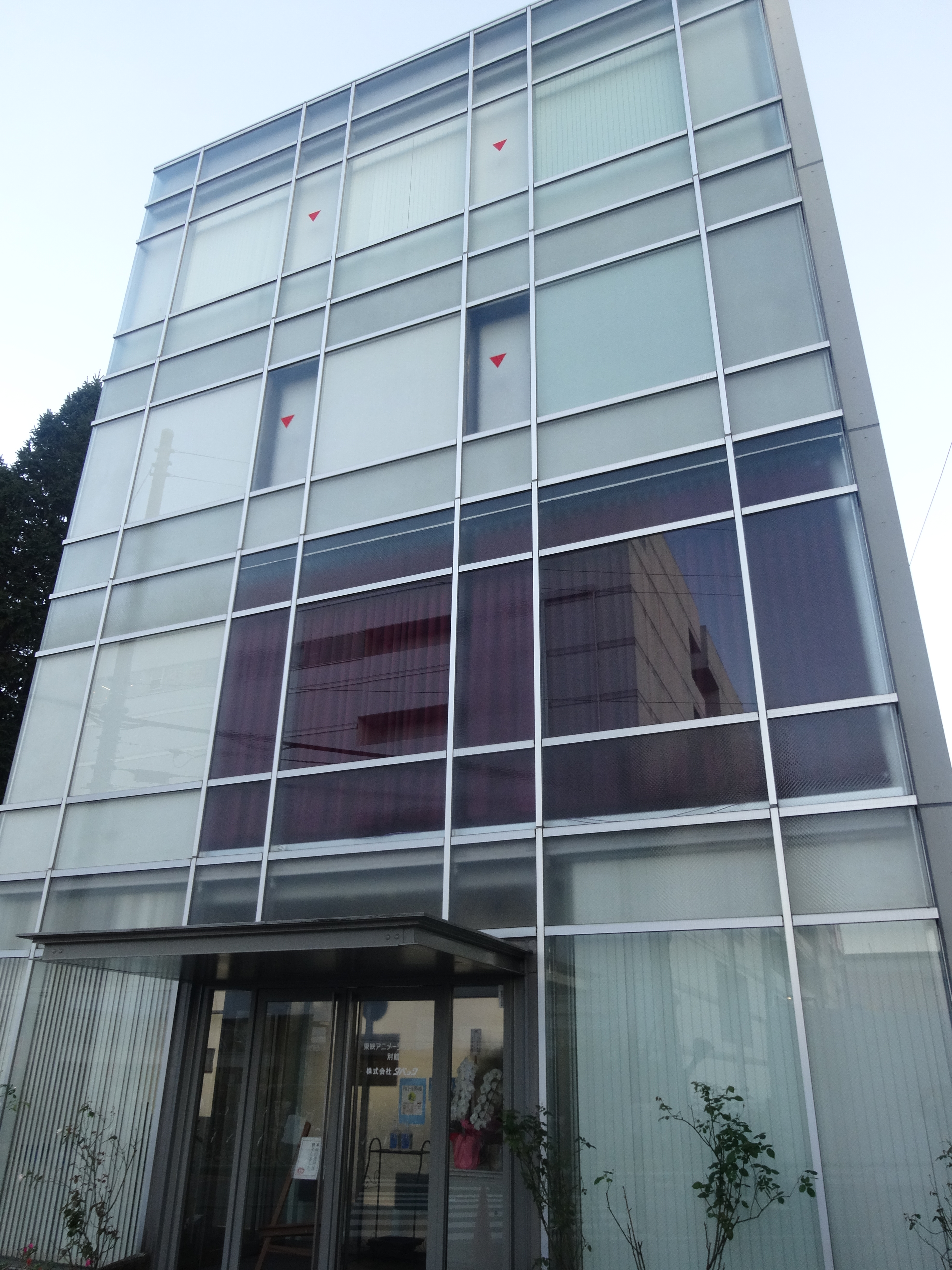 東映アニメーション 別館。現在はタバックが入居している。東京都練馬区東大泉に所在。